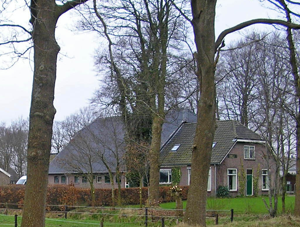 Delihoeve, Zeijerveld